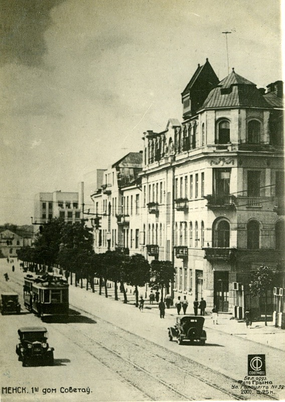 Беларуская (тарашкевіца): Менск (Miensk), вуліца Захараўская (vulica Zacharaŭskaja) ад скрыжаваньня з Ігуменскай (vulica Ihumienskaja). Сучасны пляц Незалежнасьці (plac Niezaležnaści) на старой паштоўцы